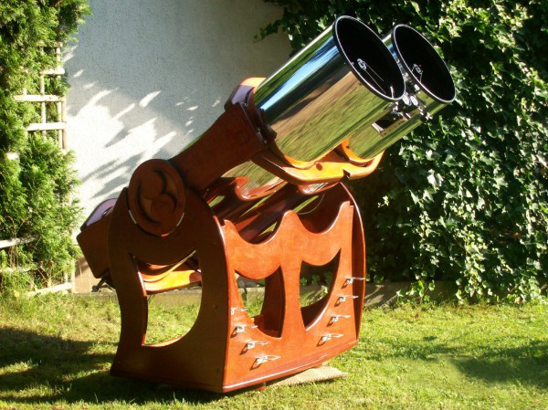 Dobson-Bino mit 2x 12" Spiegel